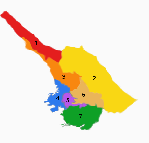 Mappa del territorio del comune di Trieste suddiviso nelle circoscrizioni di decentramento amministrativo.